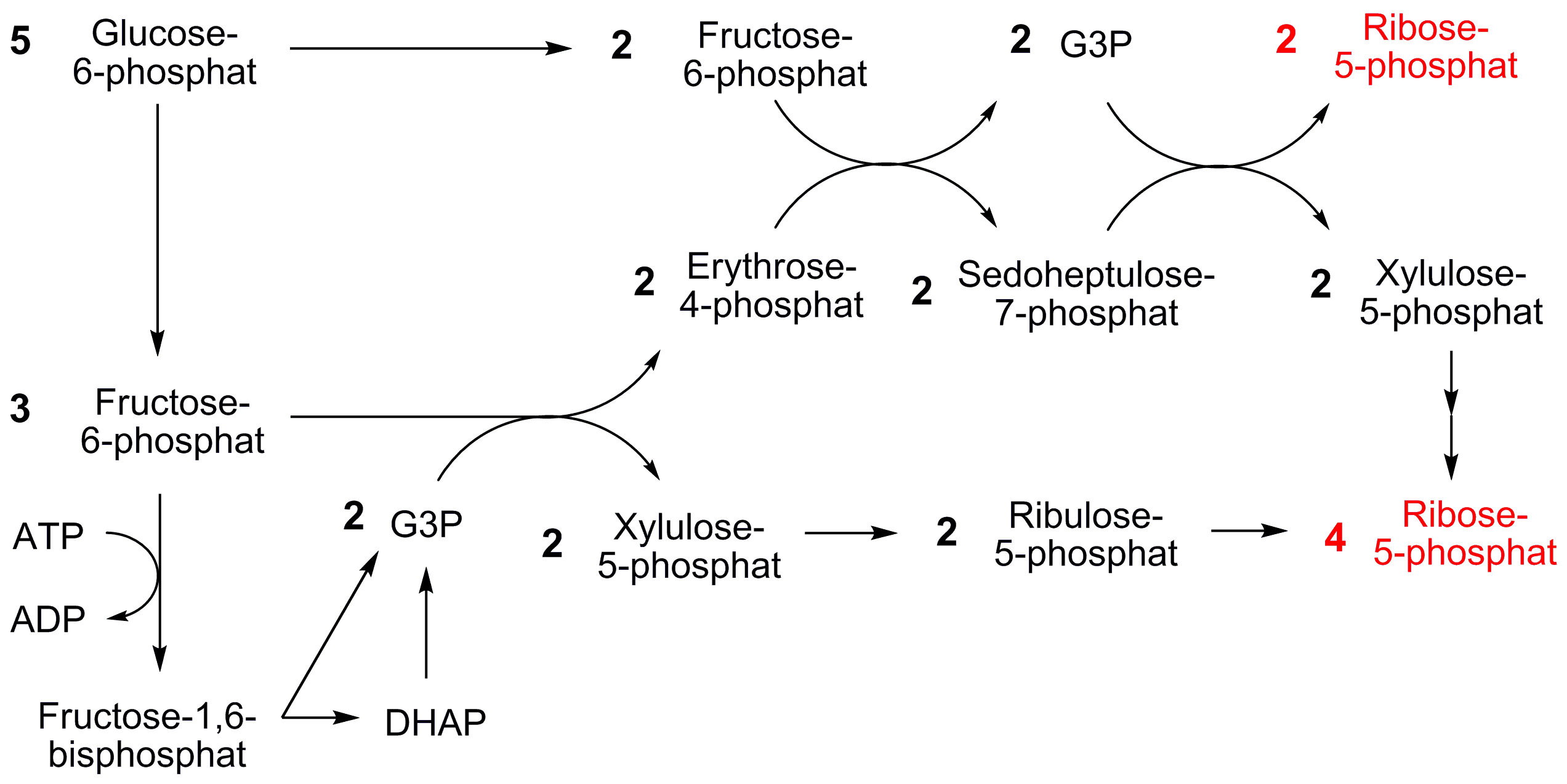 Pentosephosphatweg; hier Variante, um viel Ribose-5-phosphat zu generieren